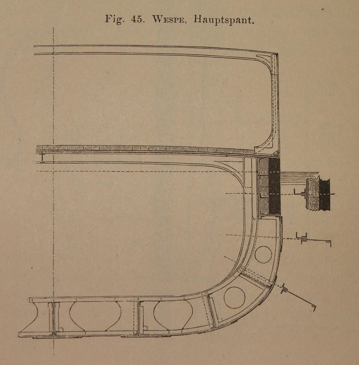 SMS Wespe Fig. 45 von Kronenfels, J. F.: Das schwimmende Flottenmaterial der Seemächte. Eine kurzgefasste Beschreibung der wichtigsten europäischen, amerikanischen und asiatischen Kriegsschiffe der neueren und neuesten Zeit. A. Hartleben's Verlag, Wien. Pest. Leipzig 1881.